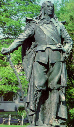 Denkmal von Peter Stuyvesant Bild stammt von: Laut Aussage dort: "Information presented on this website, unless otherwise indicated , is considered in the public domain. It may be distributed or copied as is permitted by the law."